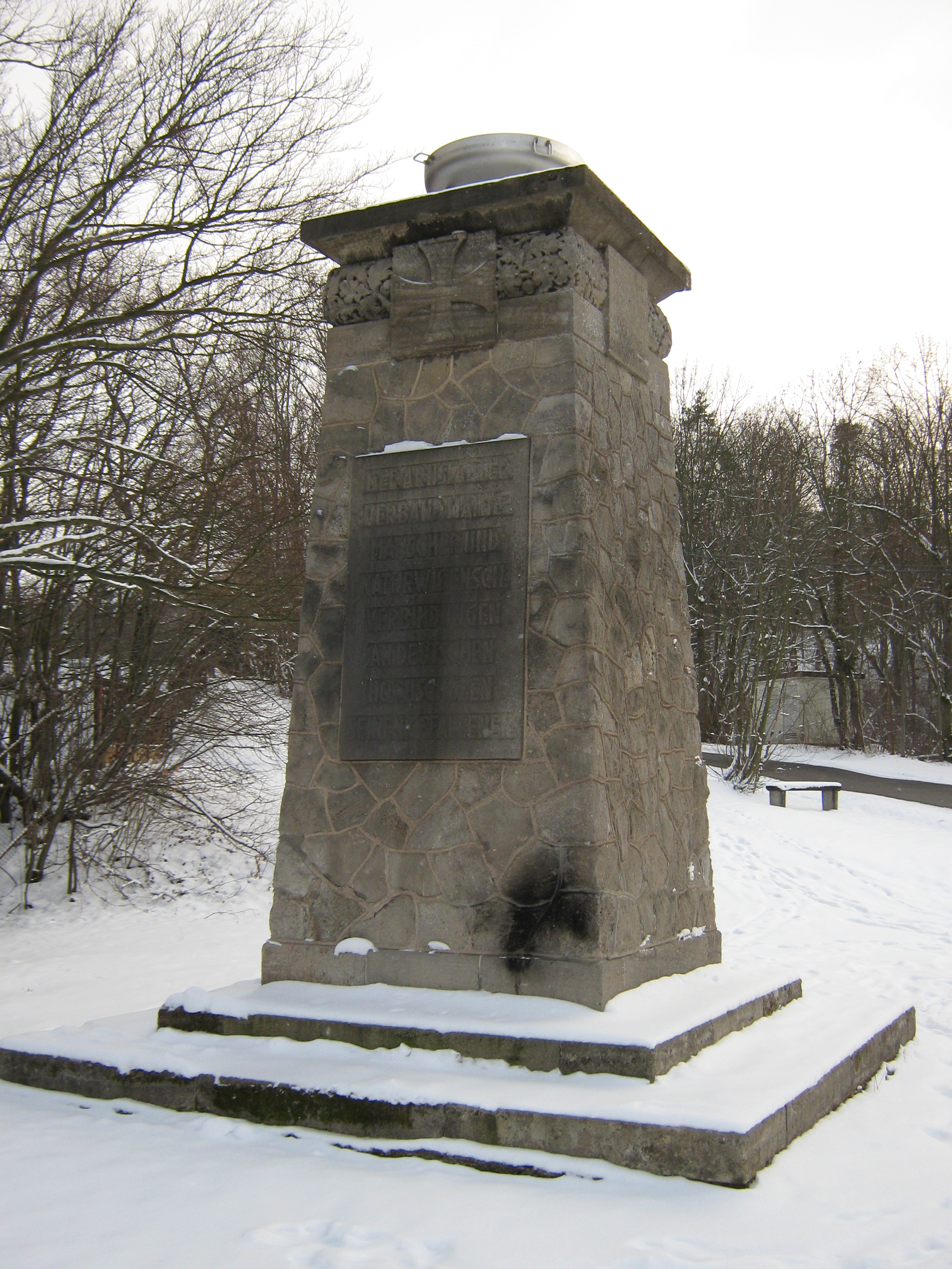 Monumento por kunstudintoj falintaj de la Unua Mondmilito sur la Alteburg-monto en Arnstadt (Germanio)